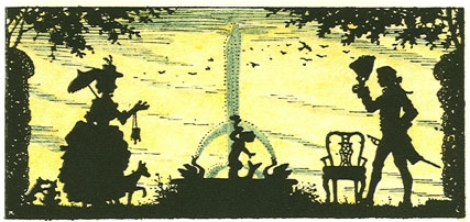 Виньетка эпохи Модерн. Россия